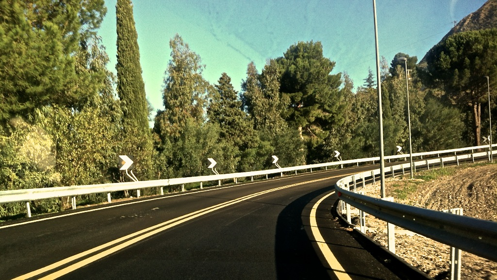 La bretella di collegamento provvisoria realizzata dopo il cedimento del viadotto Himera sull'autostrada A19 Palermo-Catania.